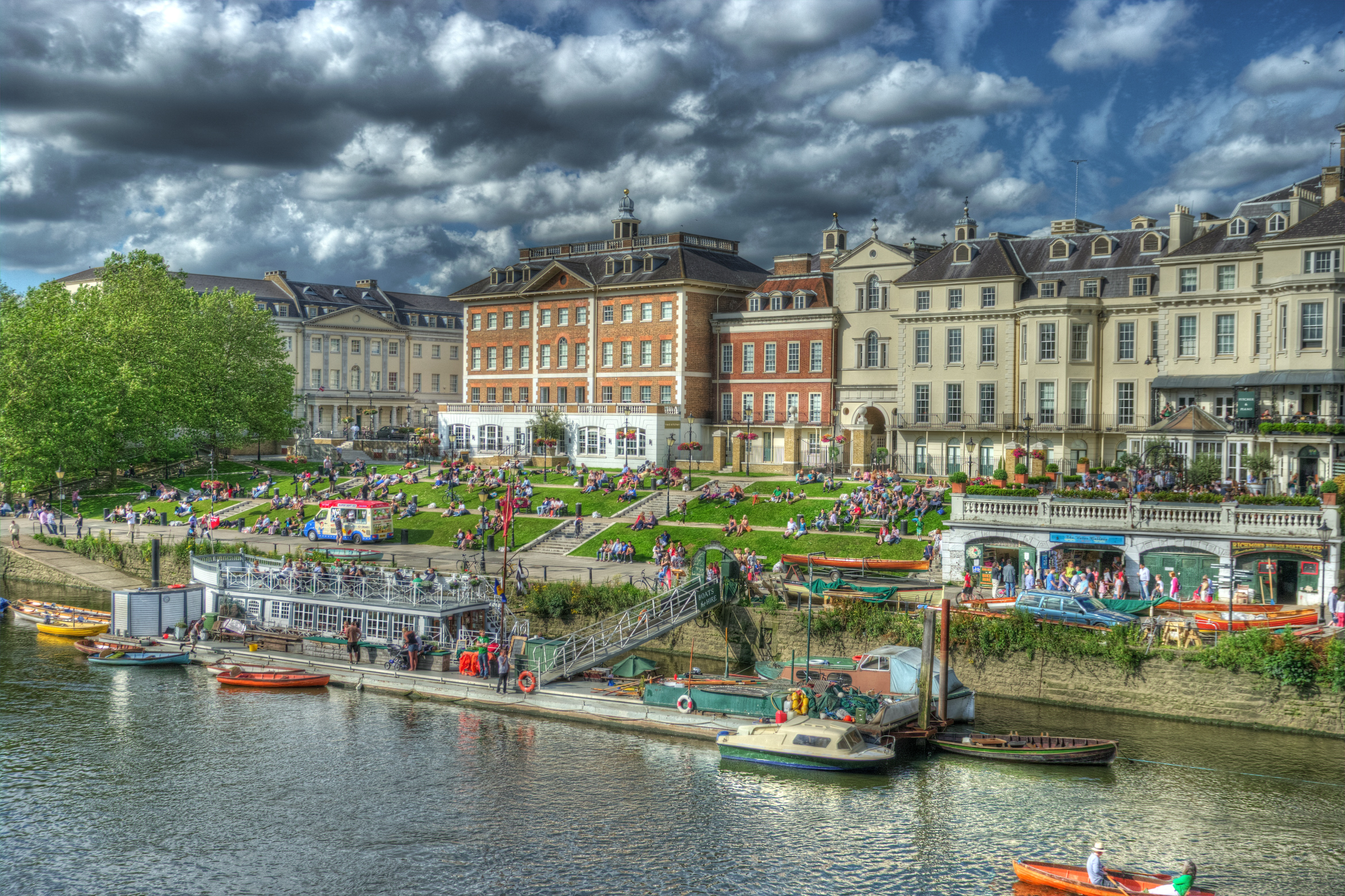 Richmond